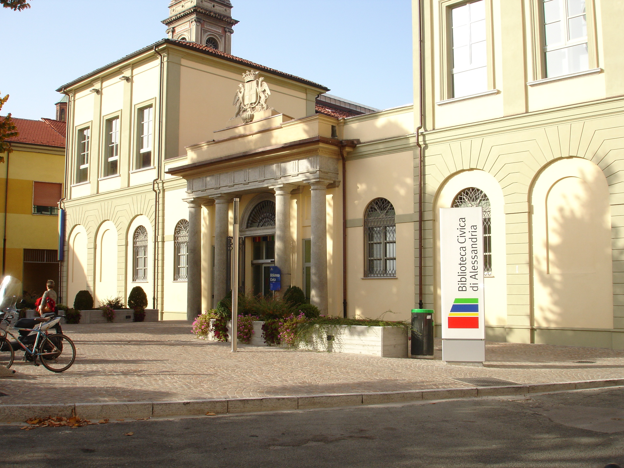 Autore: Tony Frisina